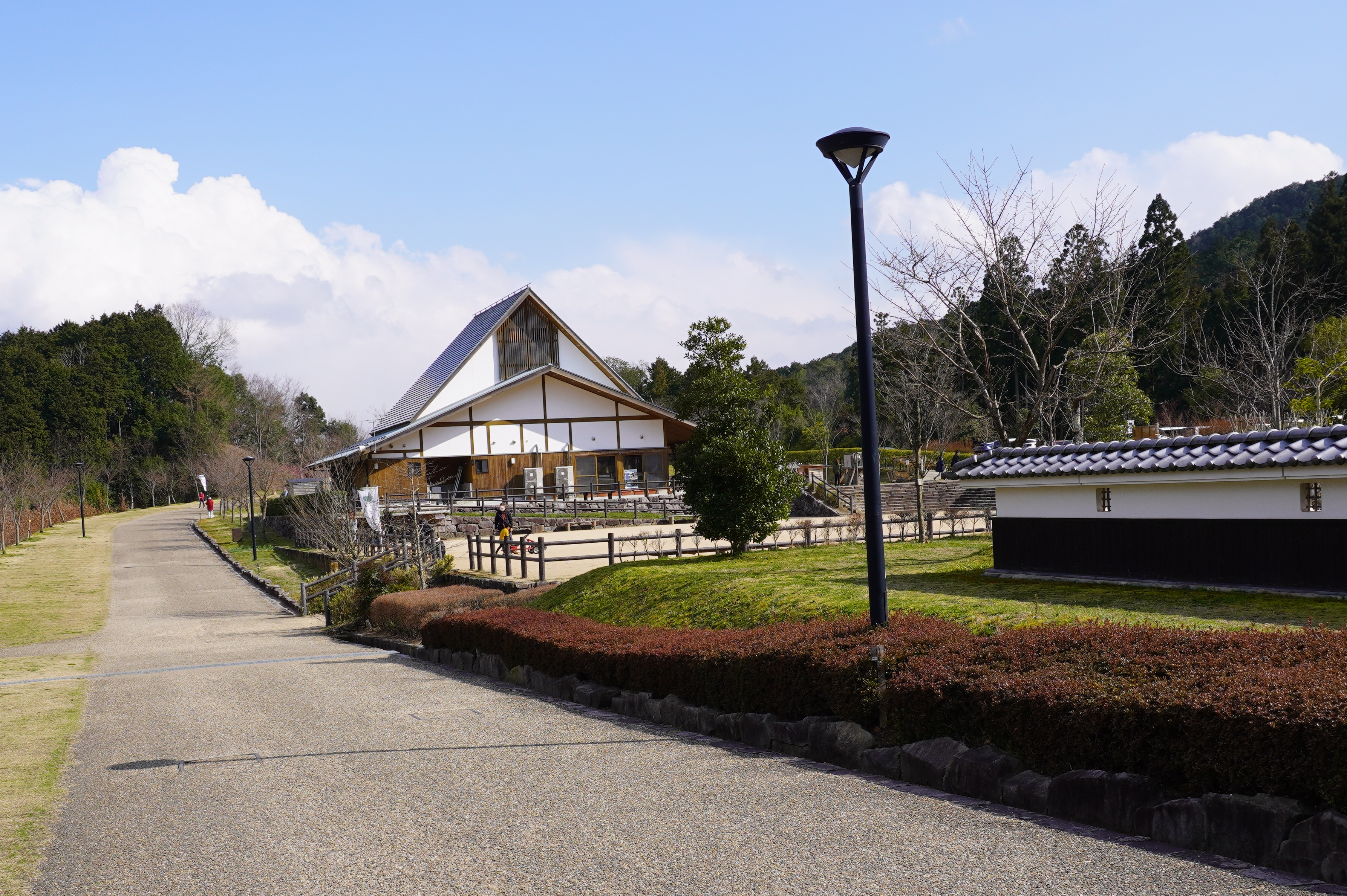 兵庫県立丹波並木道中央公園